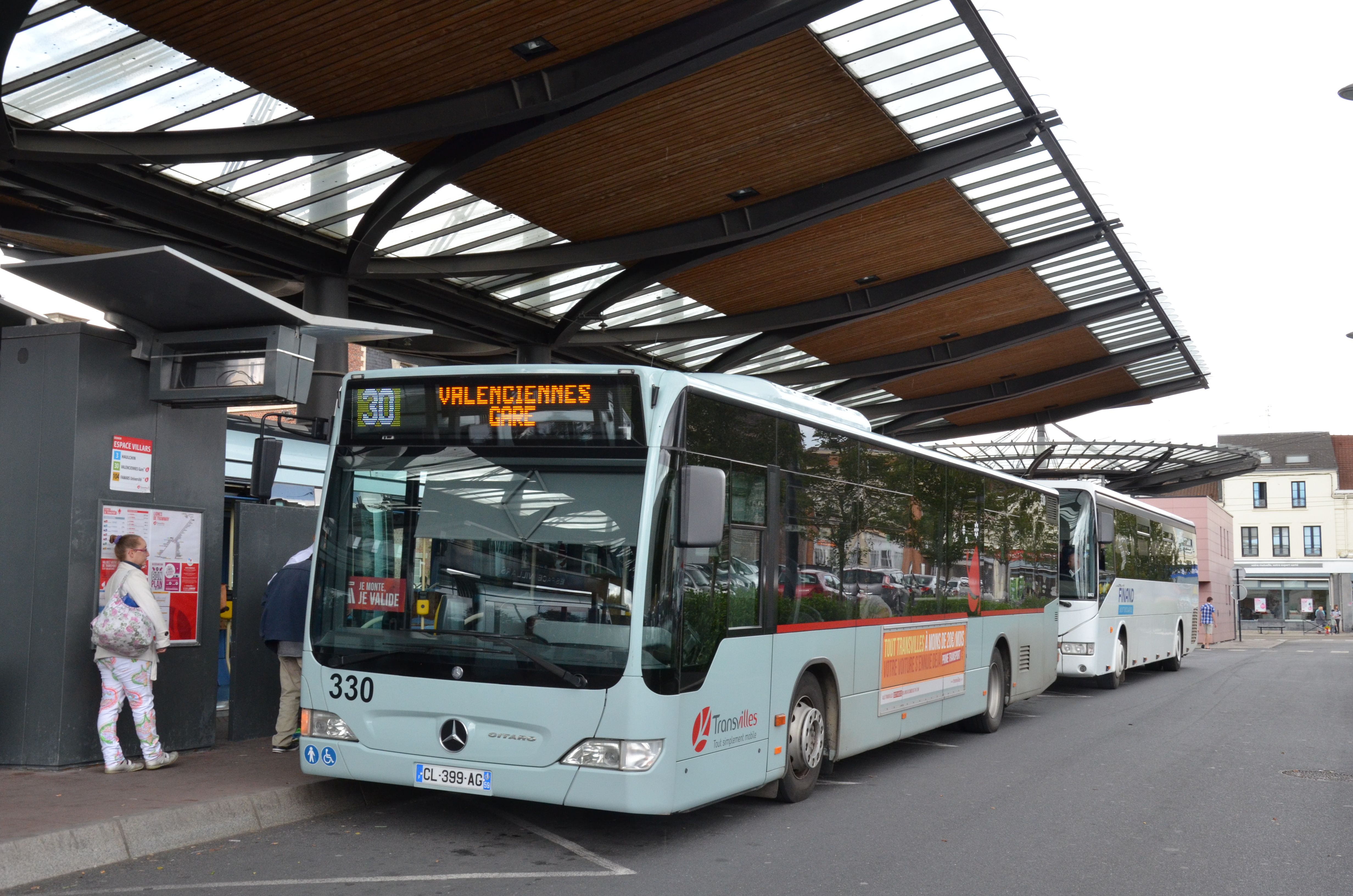 Mercedes Citaro n°330 sur la ligne 30 du réseau TRANSVILLES de Valenciennes, au terminus Espace Villars.